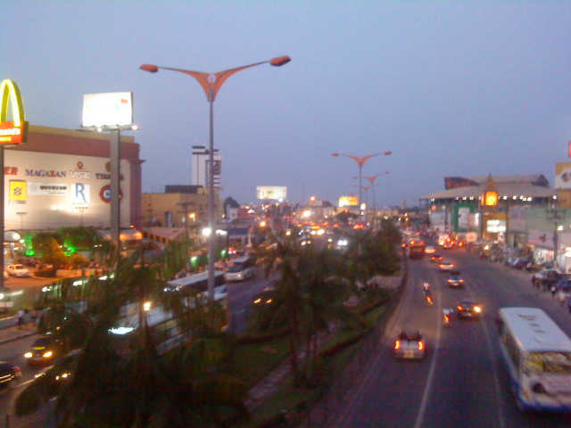 Shopping Castanheira e rodovia BR-316 vistos a partir do Pórtico Metrópole - limite dos municípios de Belém e Ananindeua